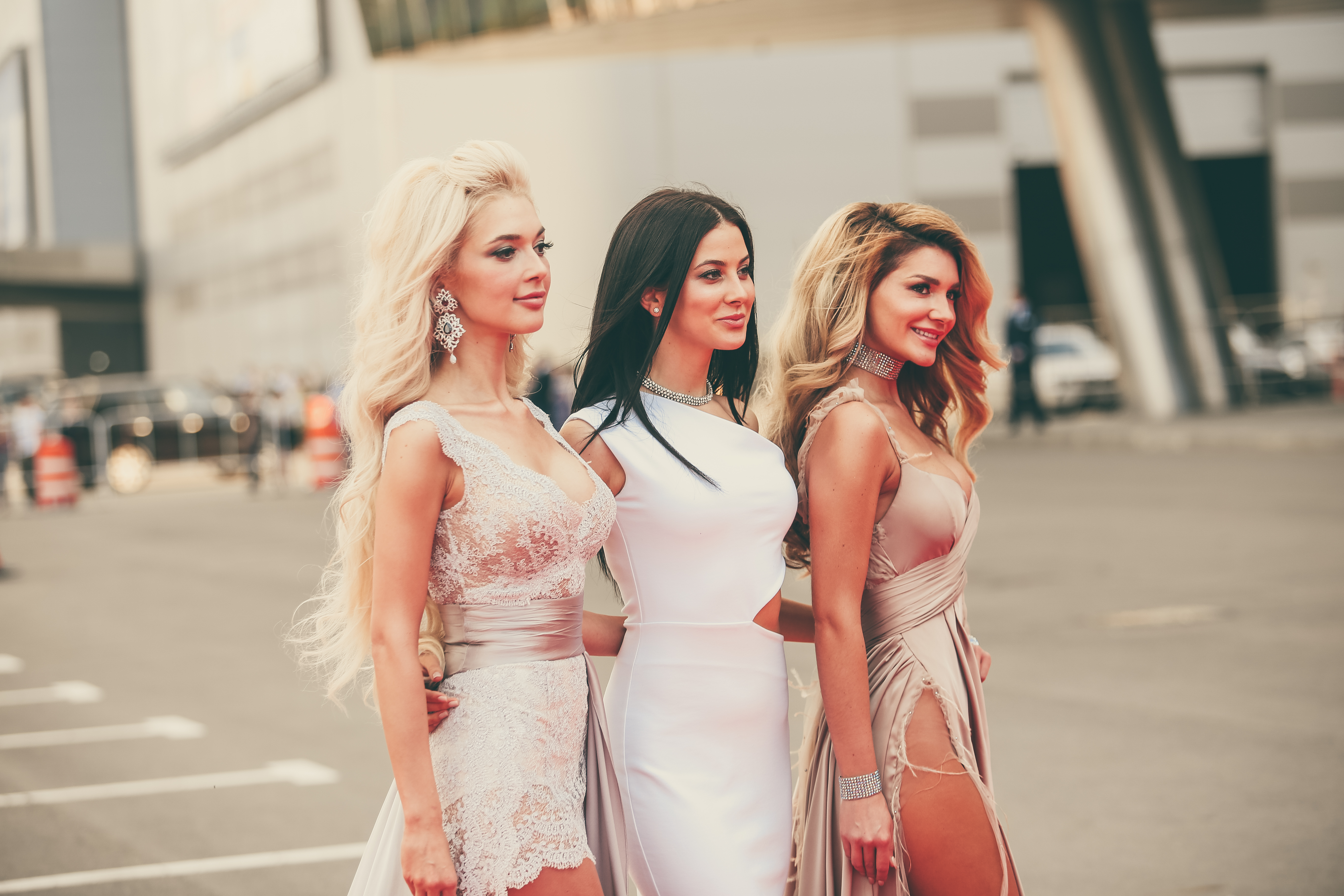 Группа «ВИА Гра» на премии телеканала «RU.TV 2016» в Москве